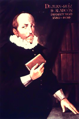 Retrato de Juan Ruiz de Alarcón del siglo XVII